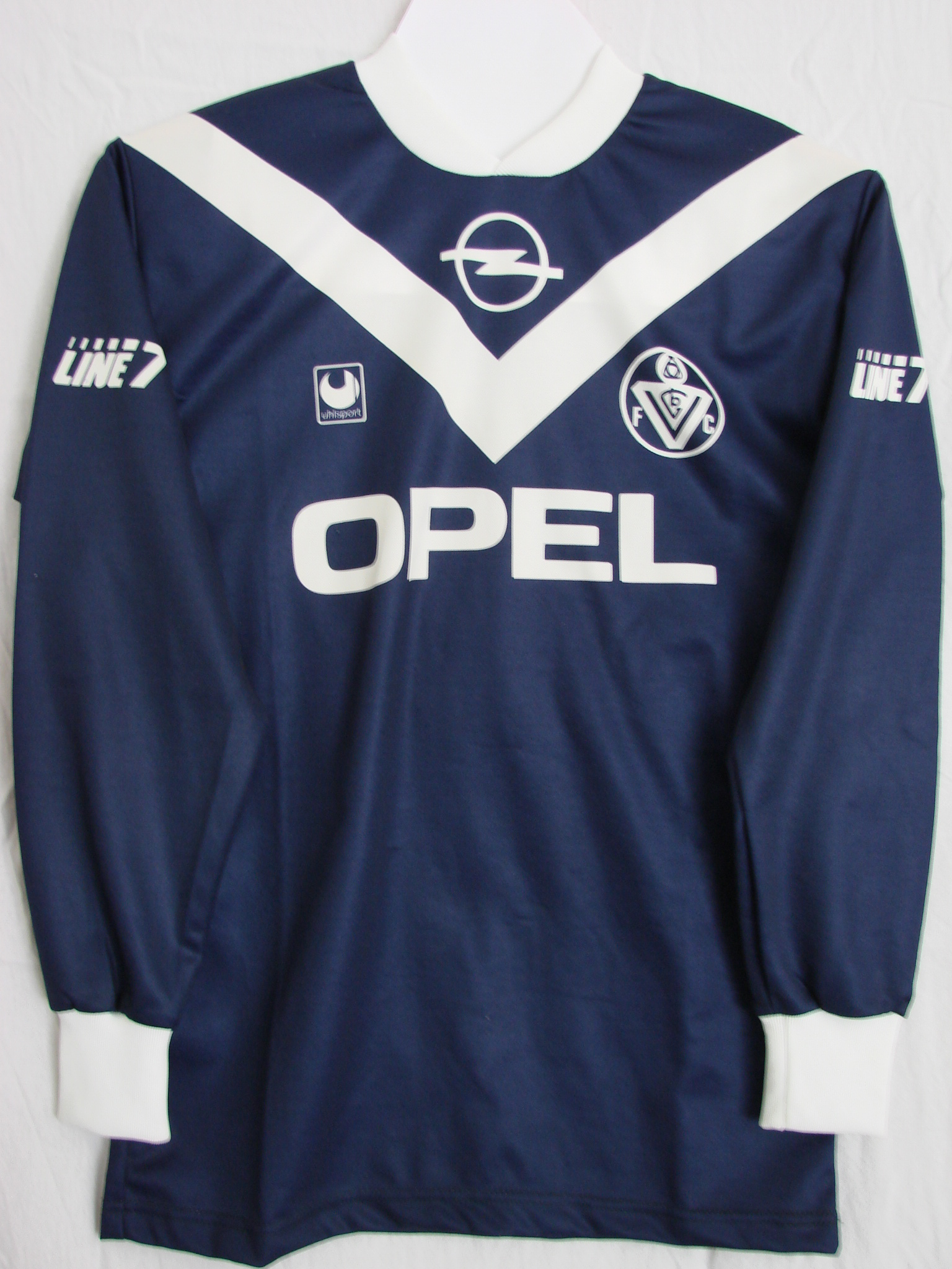 Maillot des Girondins de Bordeaux de 1990